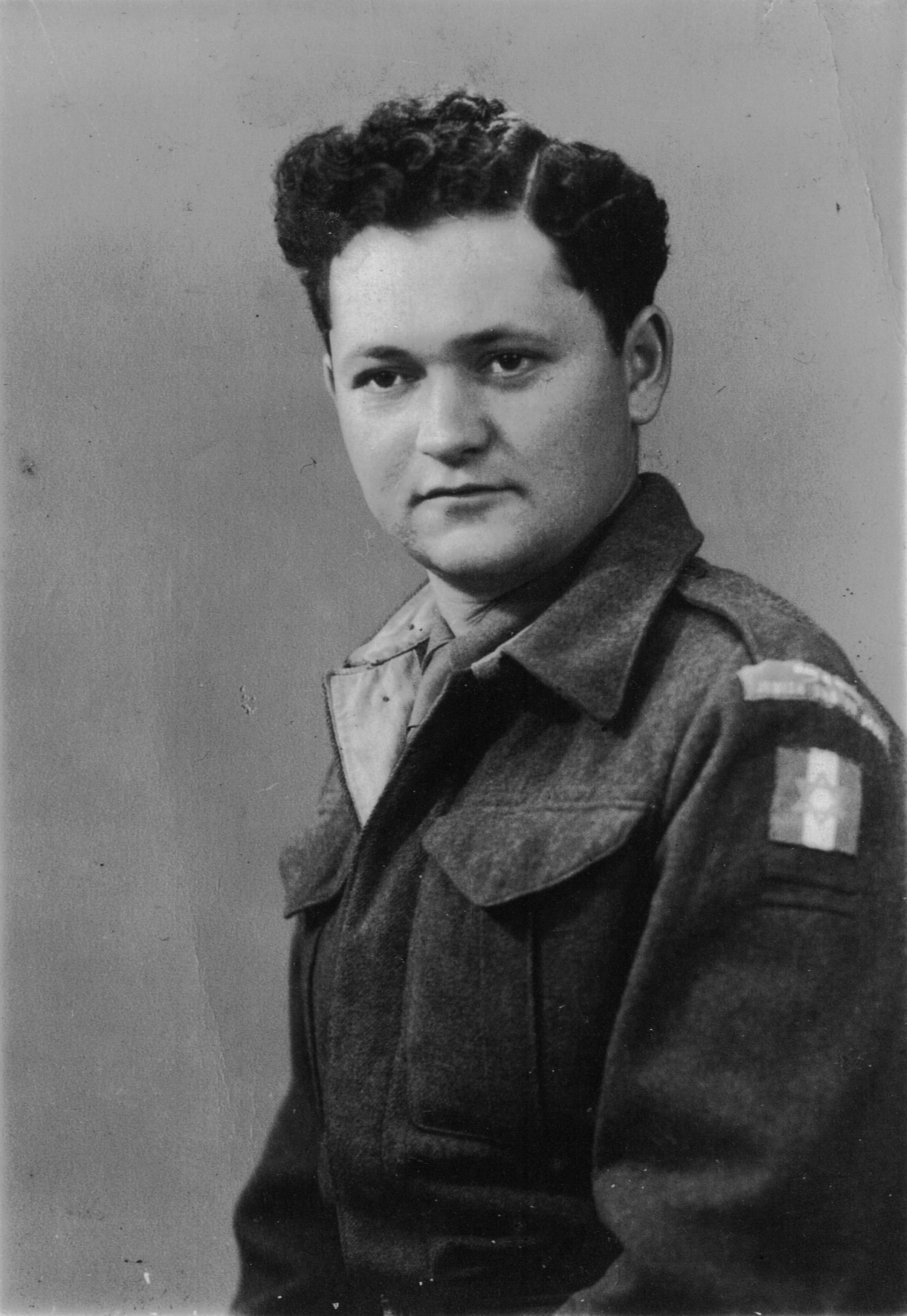 הסופר ישראל לרמן במדי הבריגדה היהודית בצבא הבריטי במלחמת העולם . המשפחה הגיעה לנשר בשנת 1929השנייה. אמו הייתה רופאת השיניים של שכונת הצריפים של נשר.